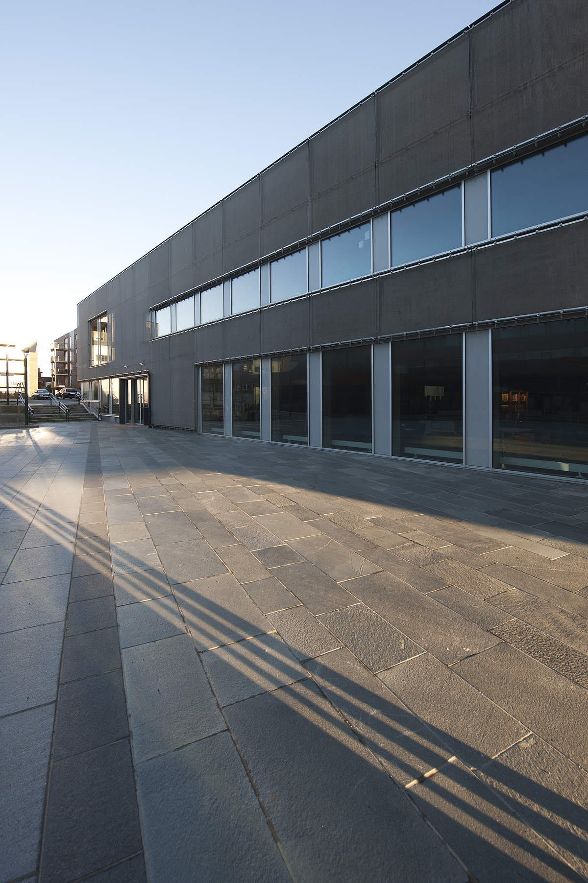 Garborgsenteret på Bryne, sett frå Garborgplassen